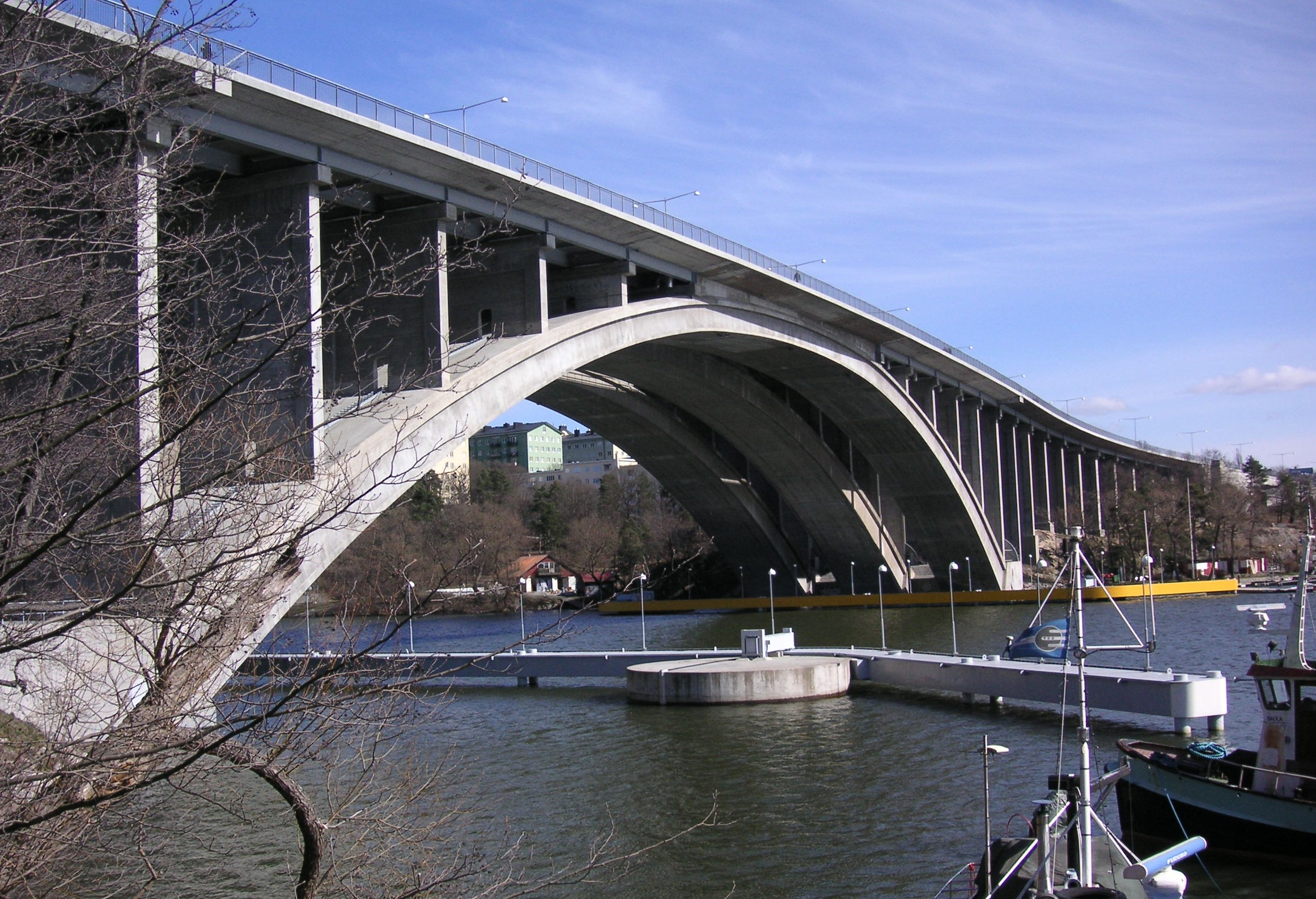 Tranebergsbron i Stockholm 2008